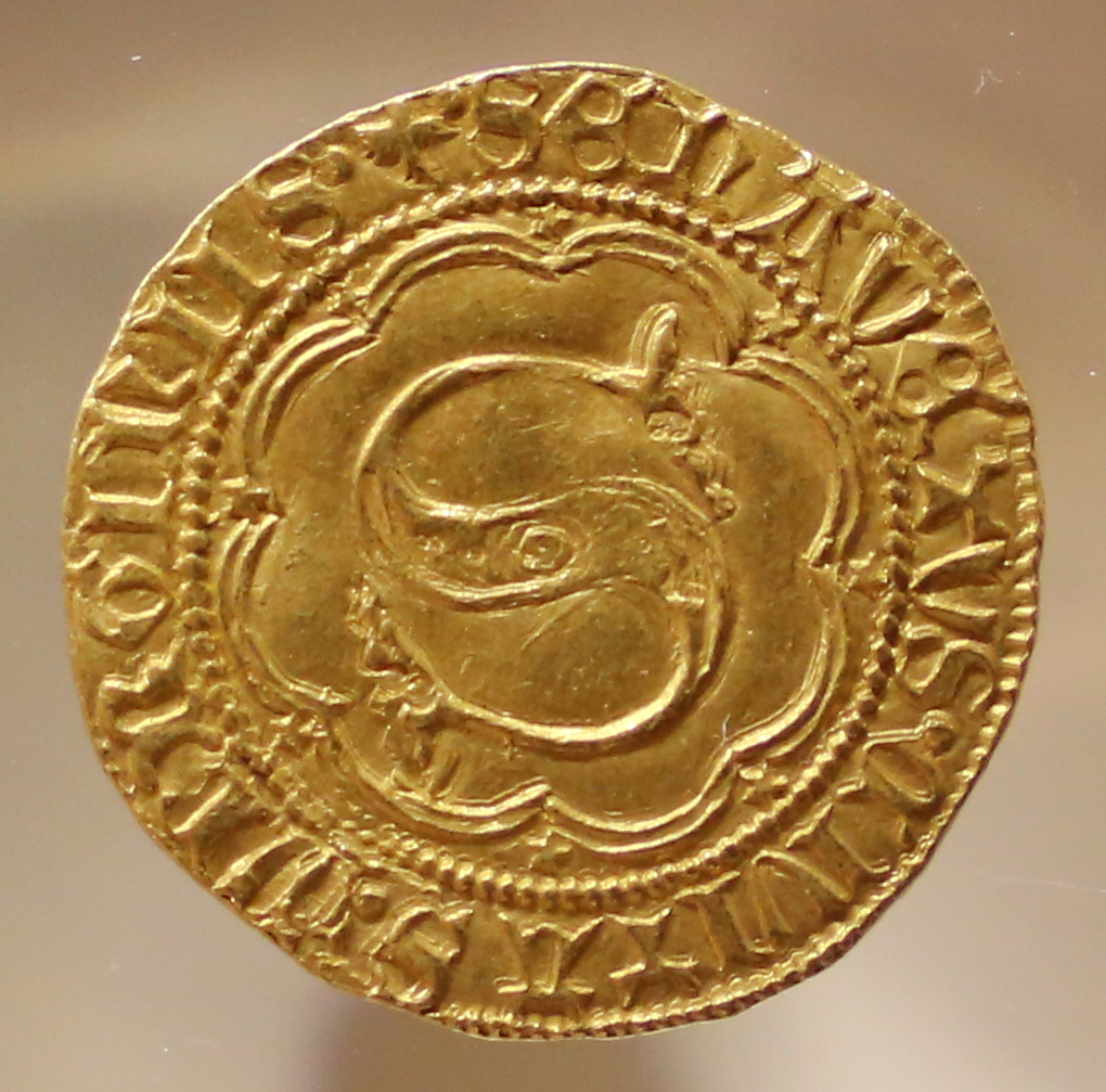 Museo di Arte Sacra (Massa Marittima) This is a photo of a monument which is part of cultural heritage of Italy.